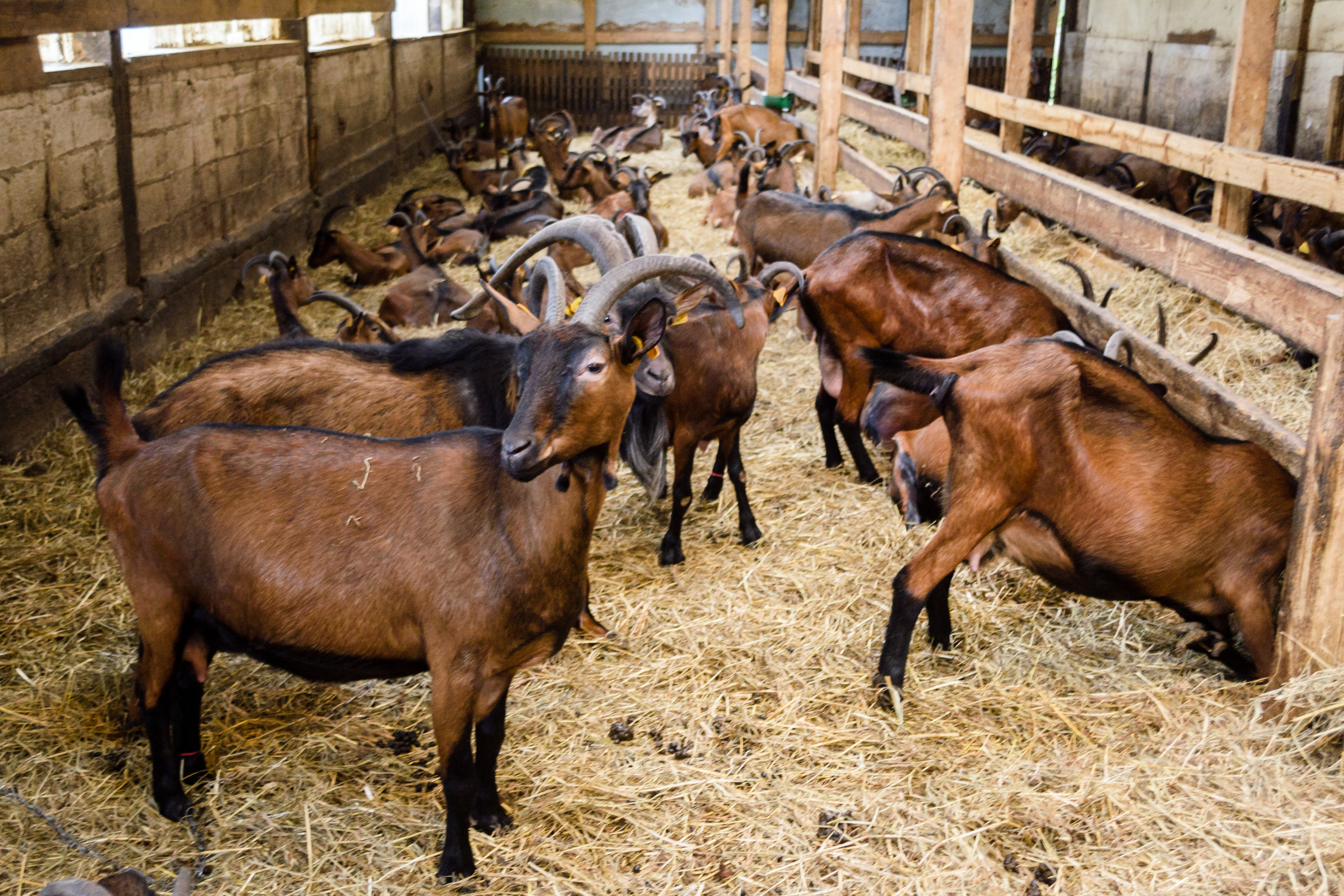 Les chèvres Alpines de la chèvrerie du Menez-Hom en Bretagne.